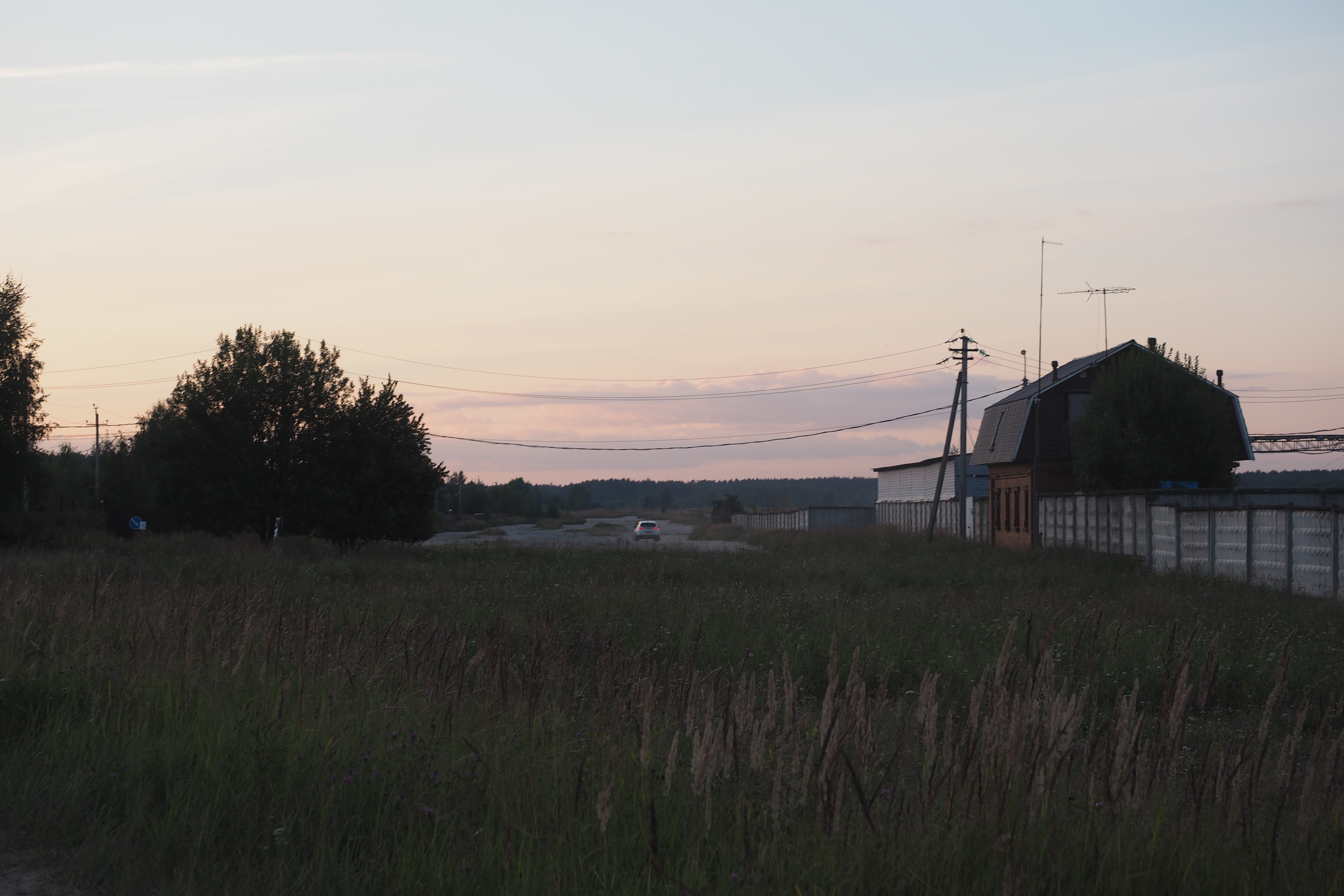 Посёлок Монино